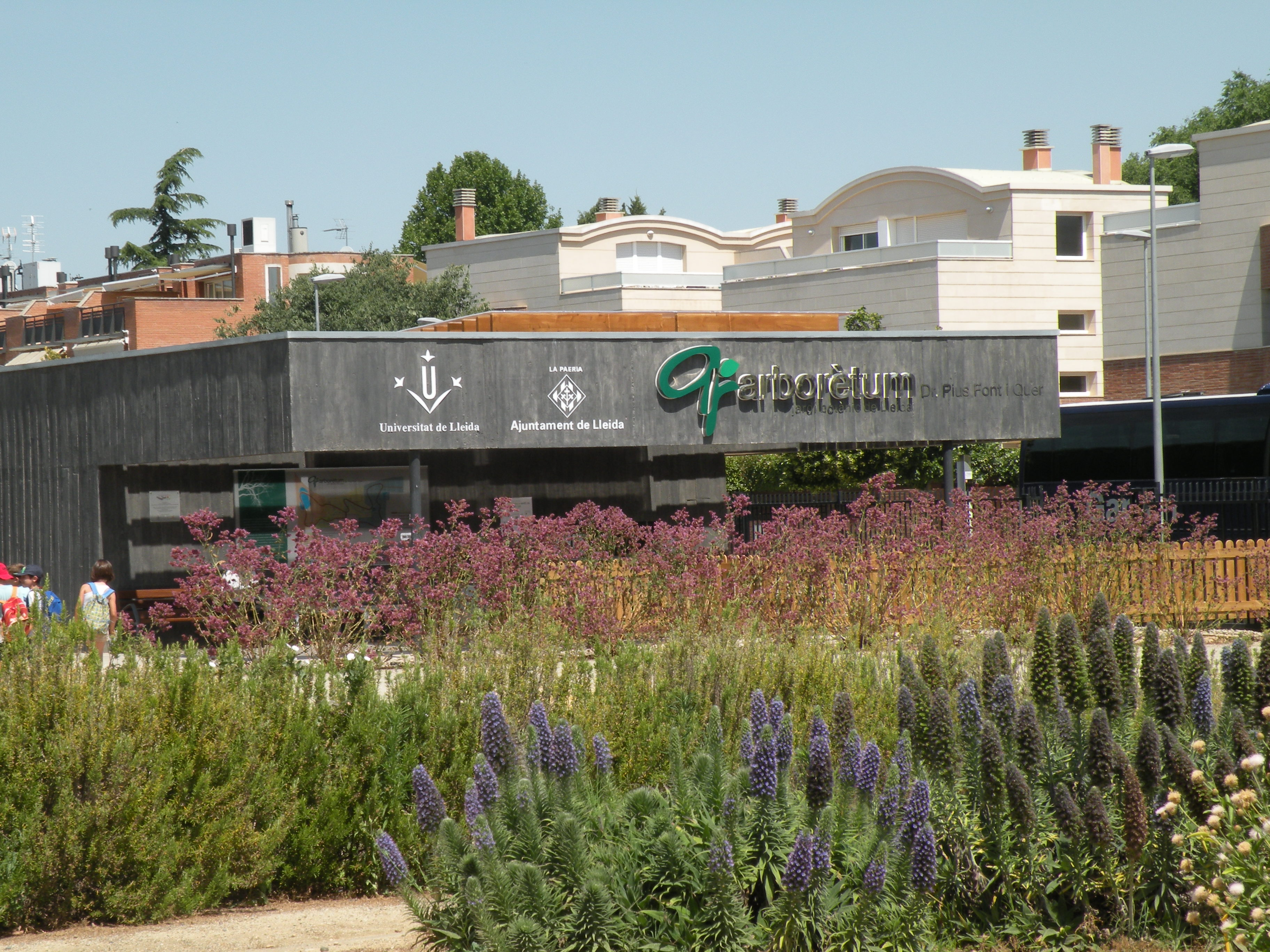 Edifici d'acollida de l'Arborètum-Jardí Botànic de Lleida